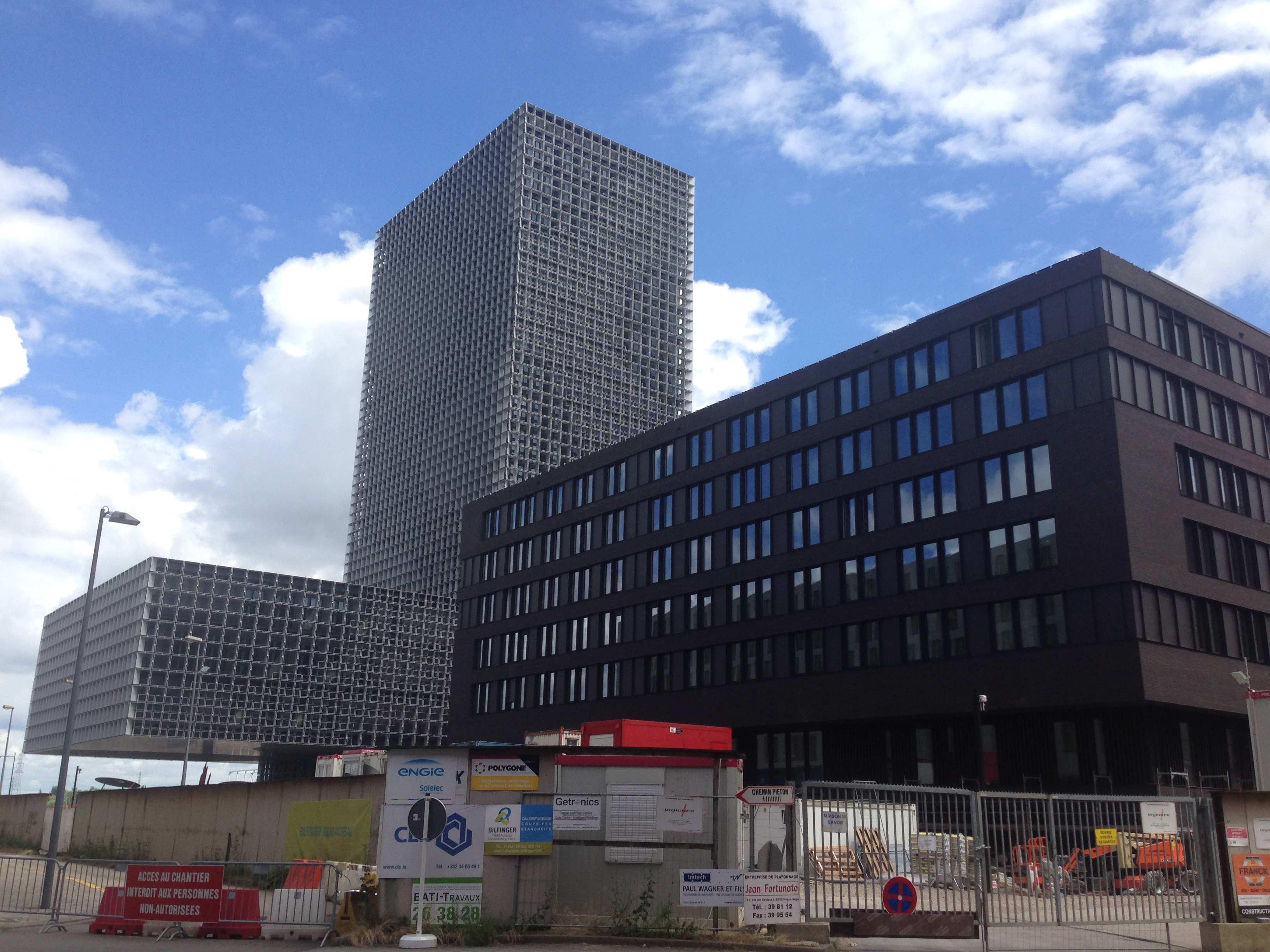 Vorne r.: Maison du Nombre; hinten: Maison du Savoir, Verwaltungs- und Seminargebäude der Universität Luxemburg in Belval, Esch an der Alzette